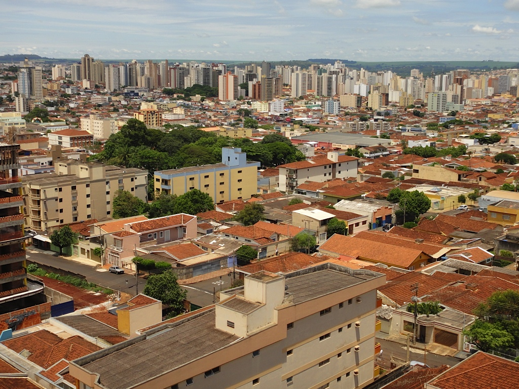 Centro de Ribeirão Preto